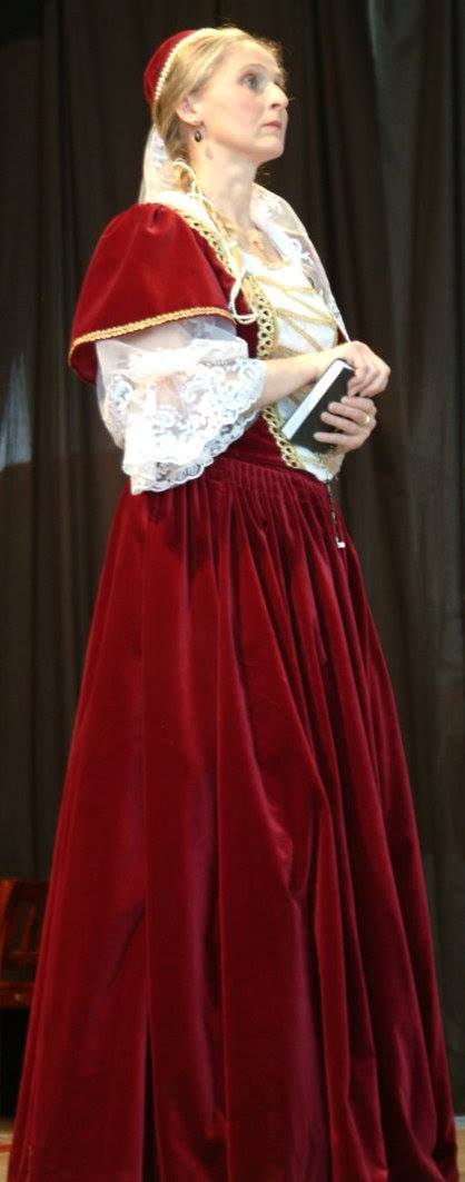 Kovács Éva Rebecca mint Zrínyi Ilona